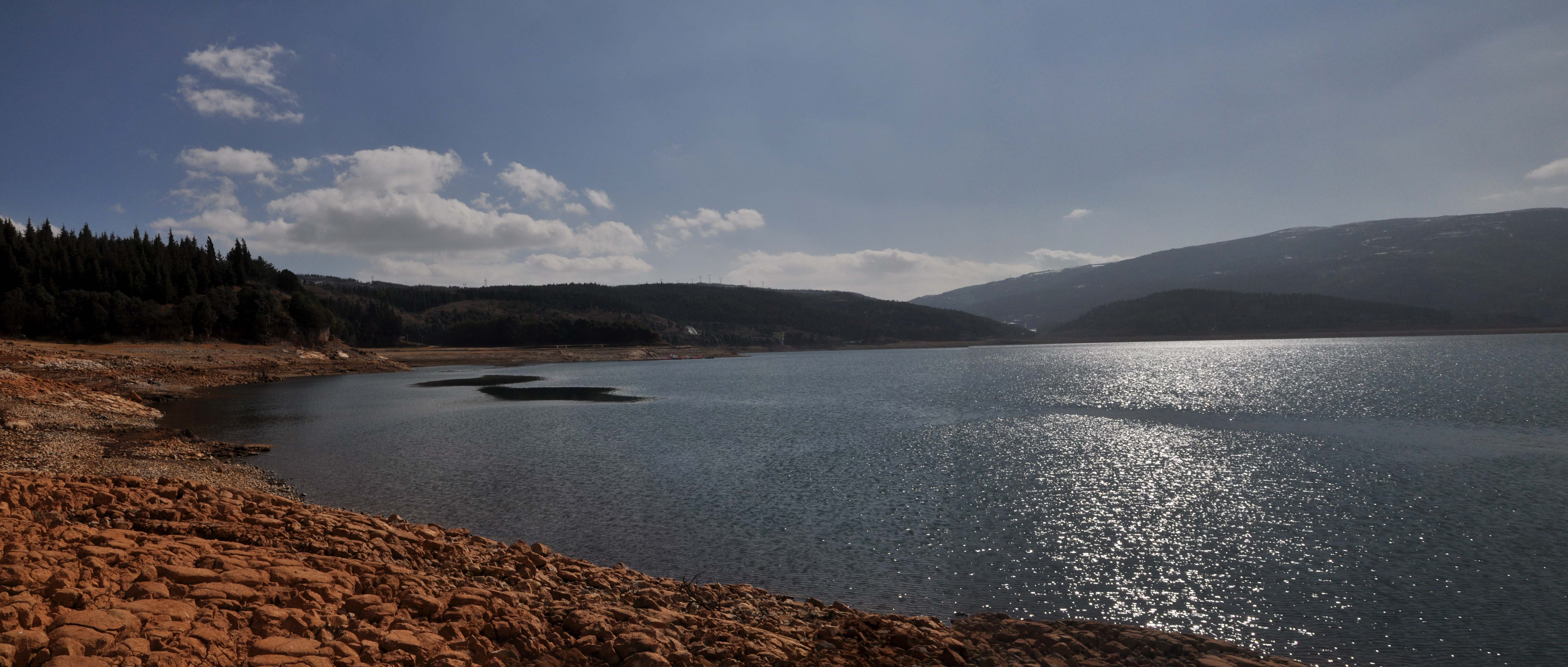 清水海南部水域。